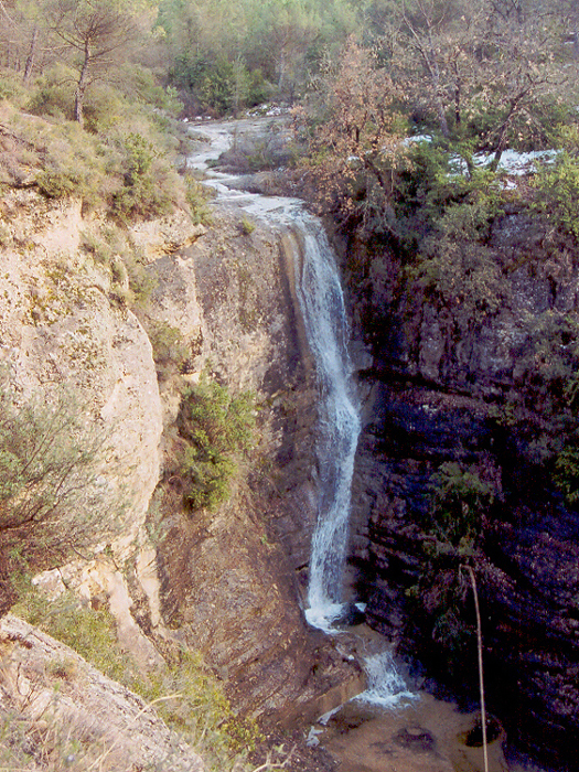 El Salt del Torrent de Colljovà (Monistrol de Calders, Moianès)